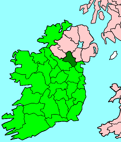 Monaghan